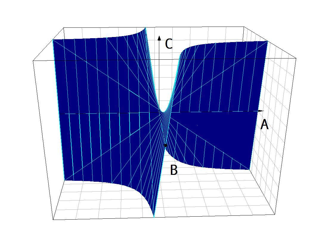 График функции f(c)=a*b